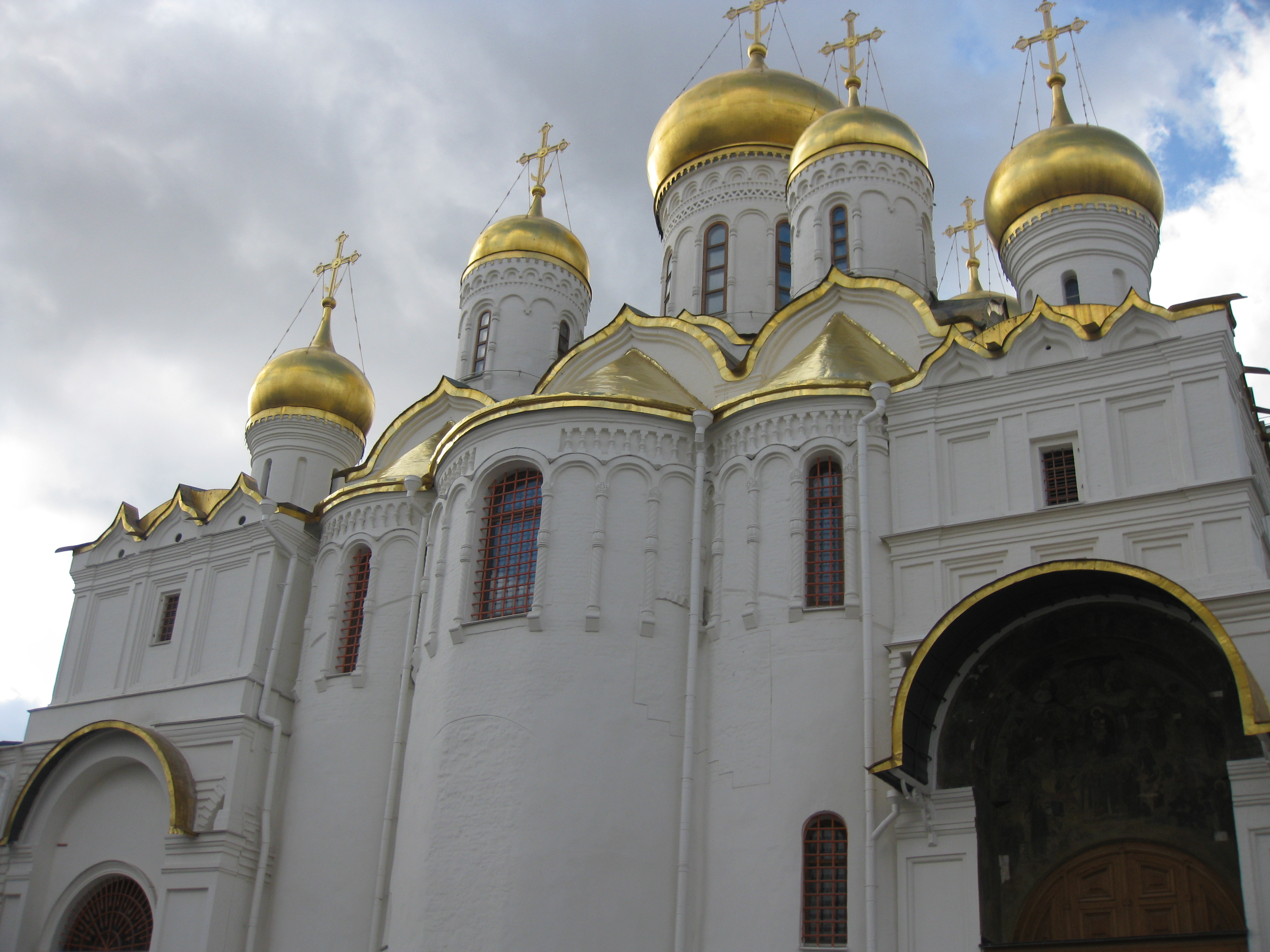 Moscow Kremlin הקרמלין